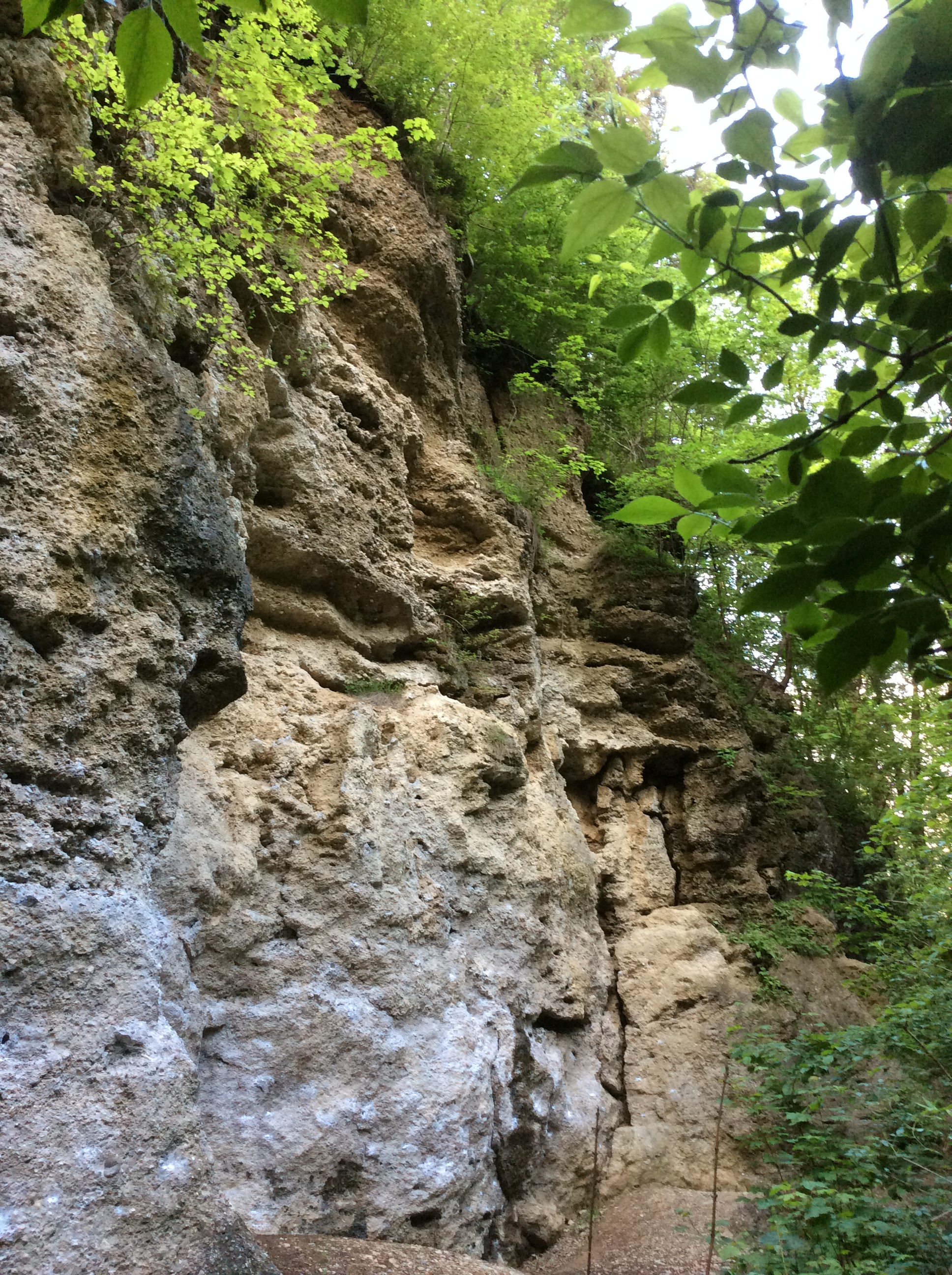 Aufschluss eiszeitlicher Schotterablagerungen aus Würm-, Riss-, Mindel- und Günz-Eiszeit (von oben nach unten) bei Baierbrunn im Isartal, Klettergarten, gehört zu Bayerns schönsten Geotopen, 184A001